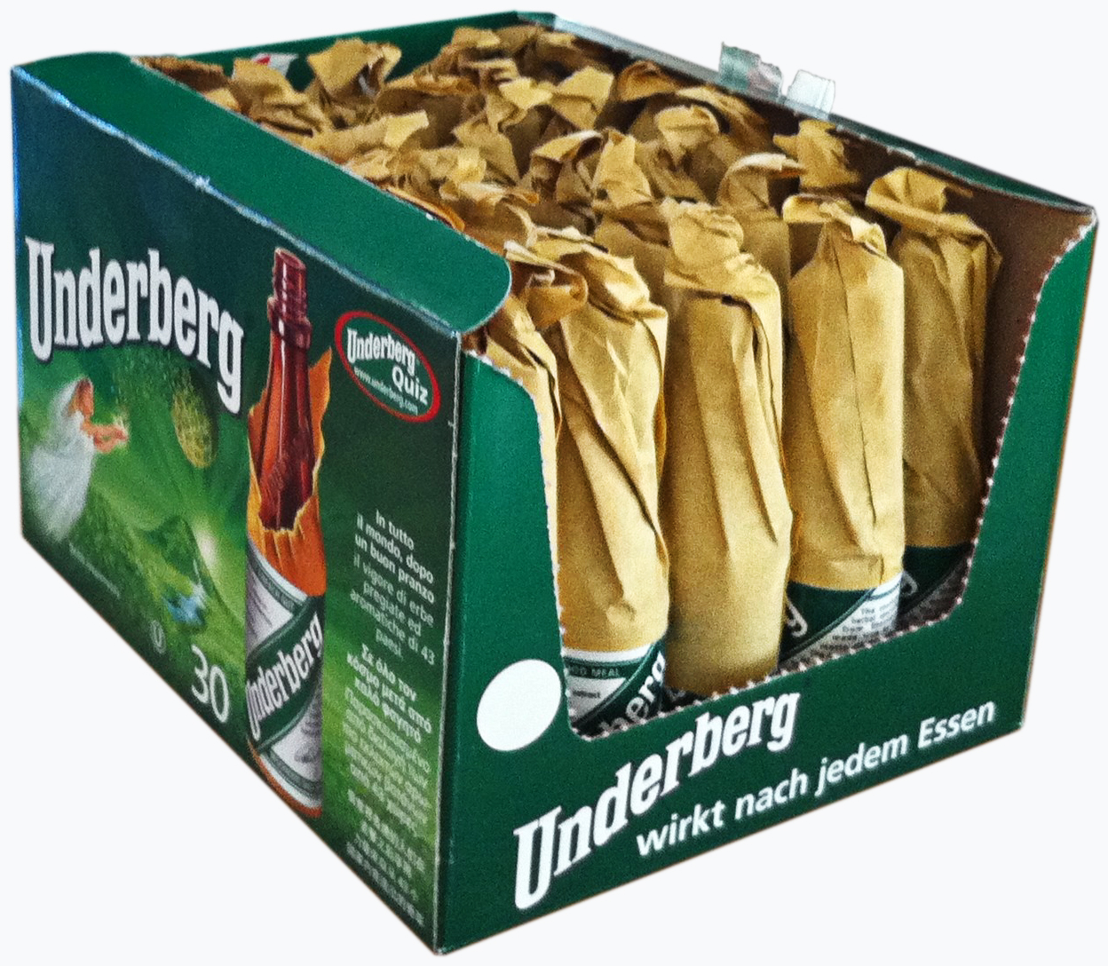 Underberg